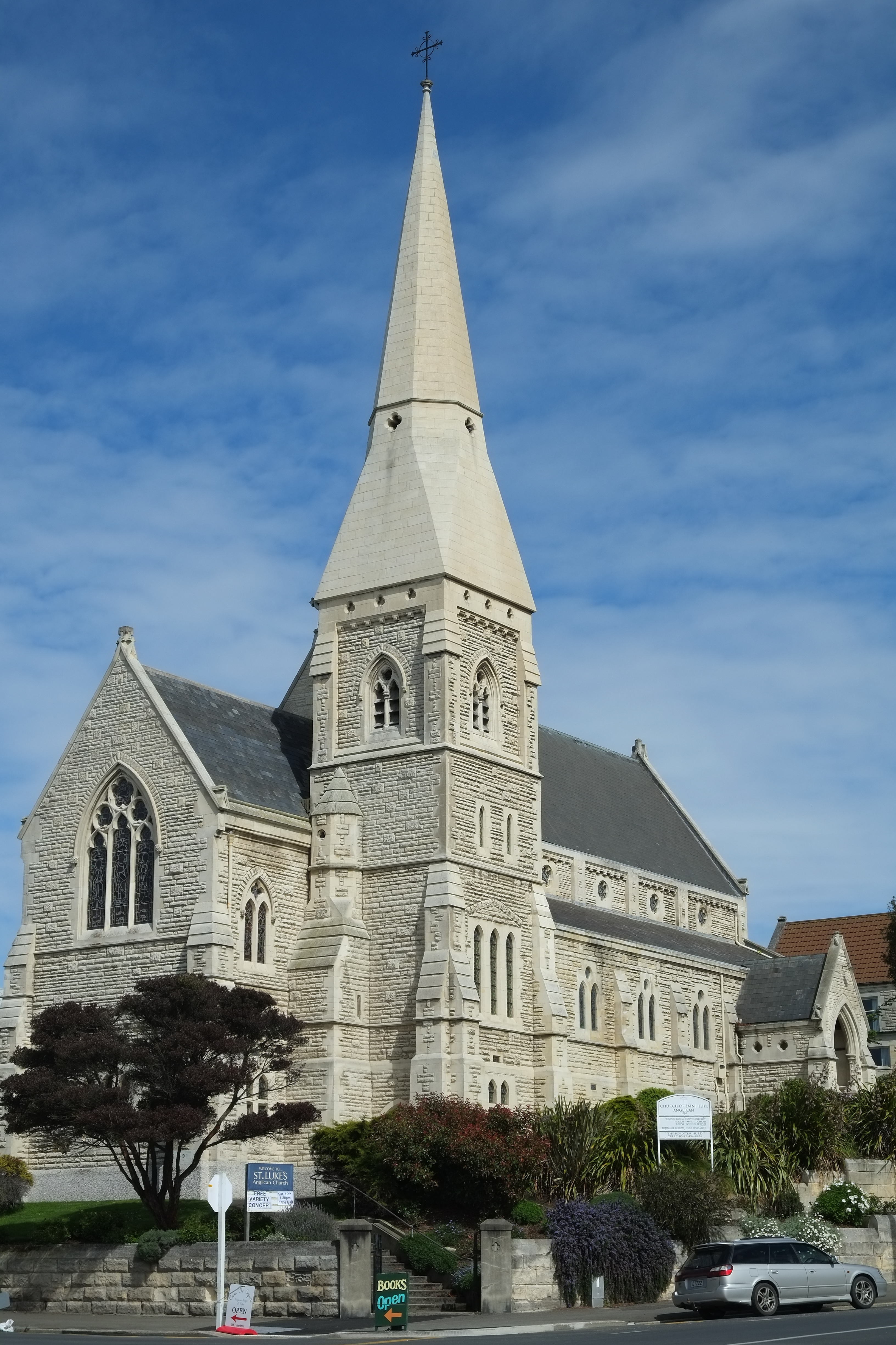 St Lukes Church in Oamaru